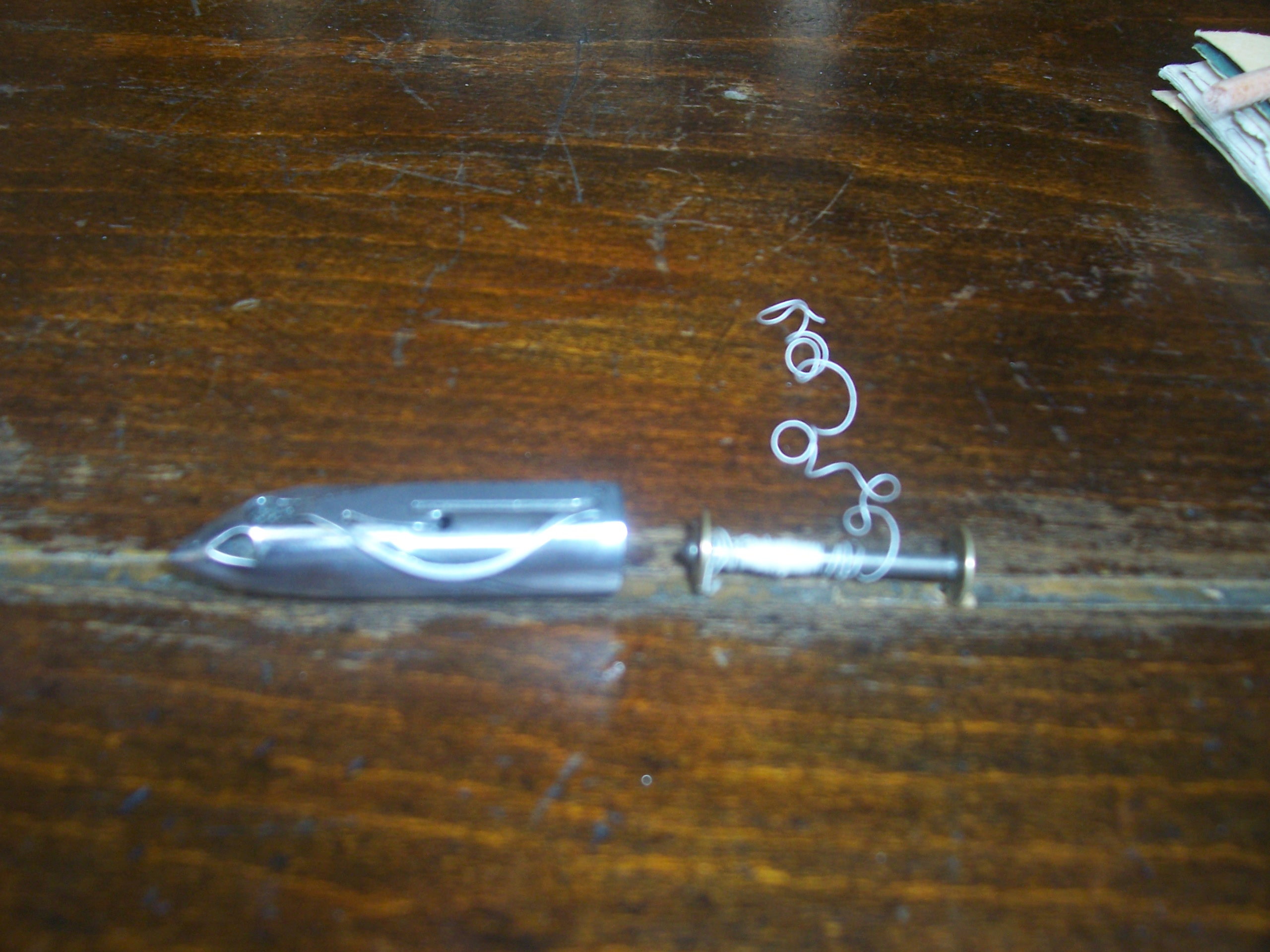 photo descriptive de machine à coudre Singer à navette